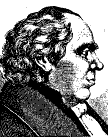 Johann Christian Friedrich Haeffner 1759-1833